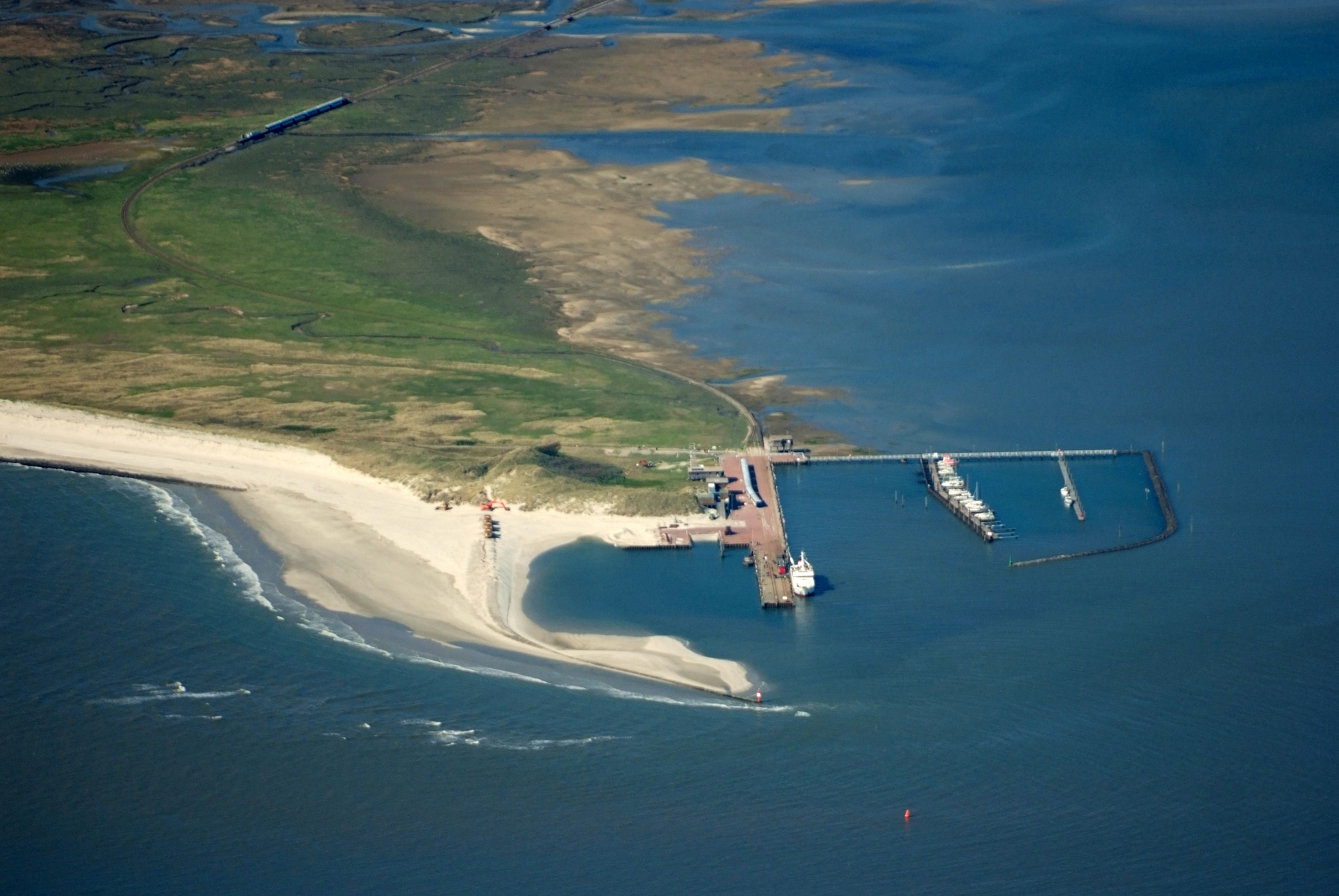 Wangerooge Westanleger Fotoflug vom Flugplatz Nordholz-Spieka über Bremerhaven, Wilhelmshaven und die Ostfriesischen Inseln bis Borkum Wangerooge Westanleger